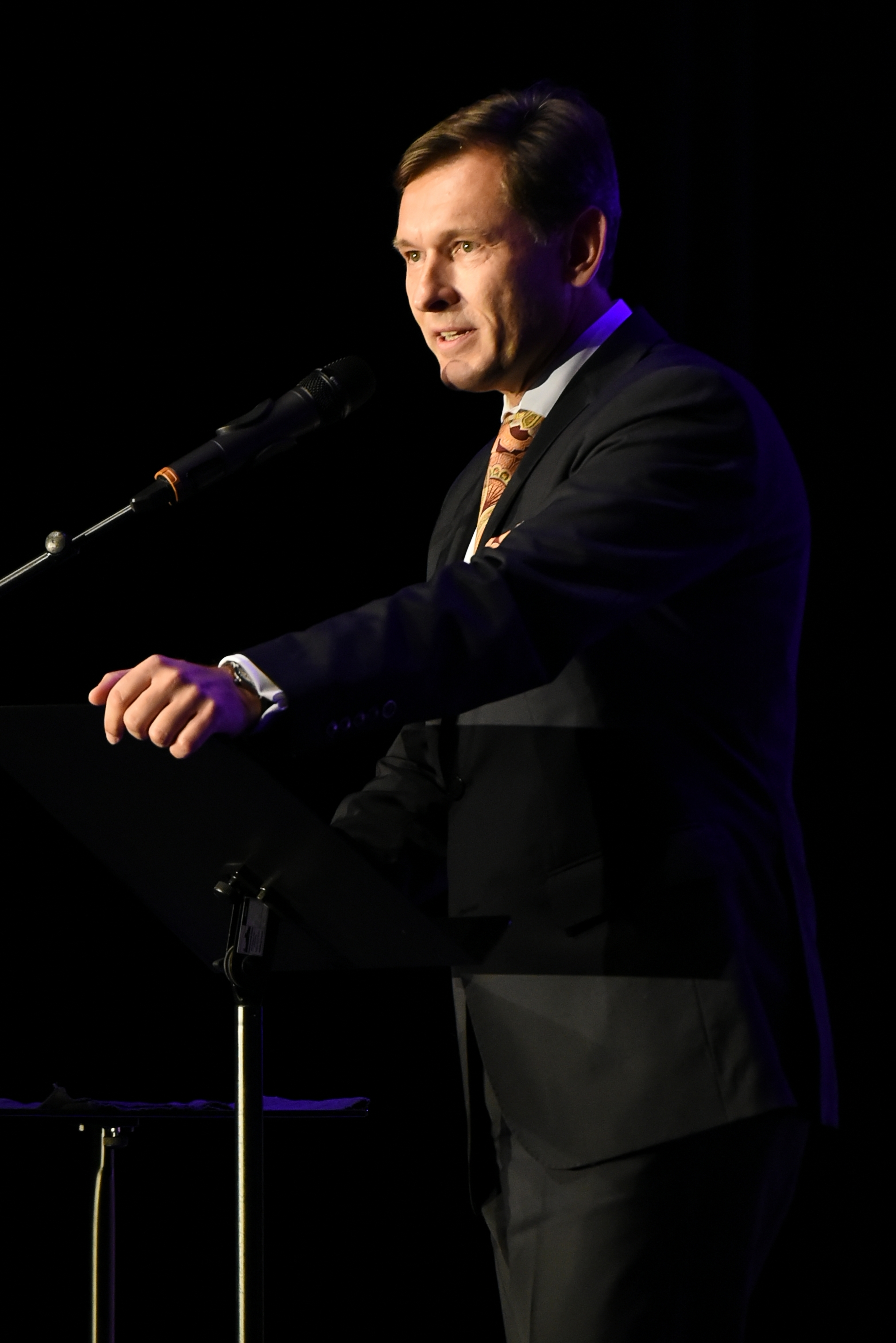 Frank Dudda bei der Verleihung des Publikumspreises von Tegtmeiers Erben 2015 im Kulturzentrum Herne.